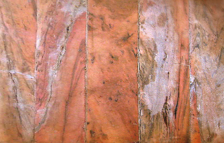 Etowah Fleuri marble